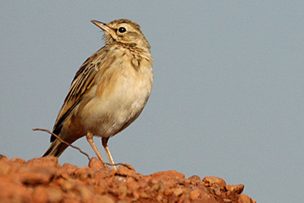 Uganda African Pipit (Anthus cinnamomeus)